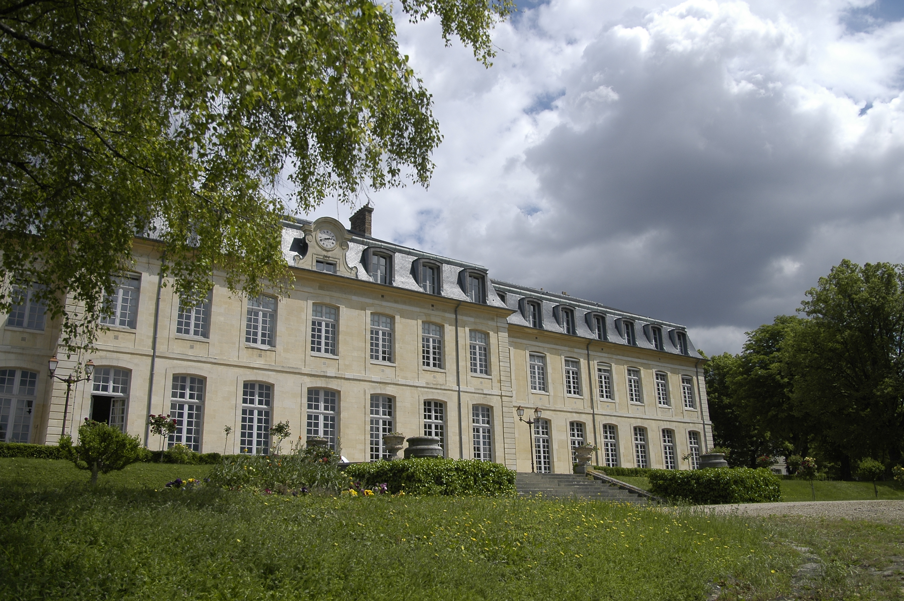 Photo du Lycée Michelet à Vanves